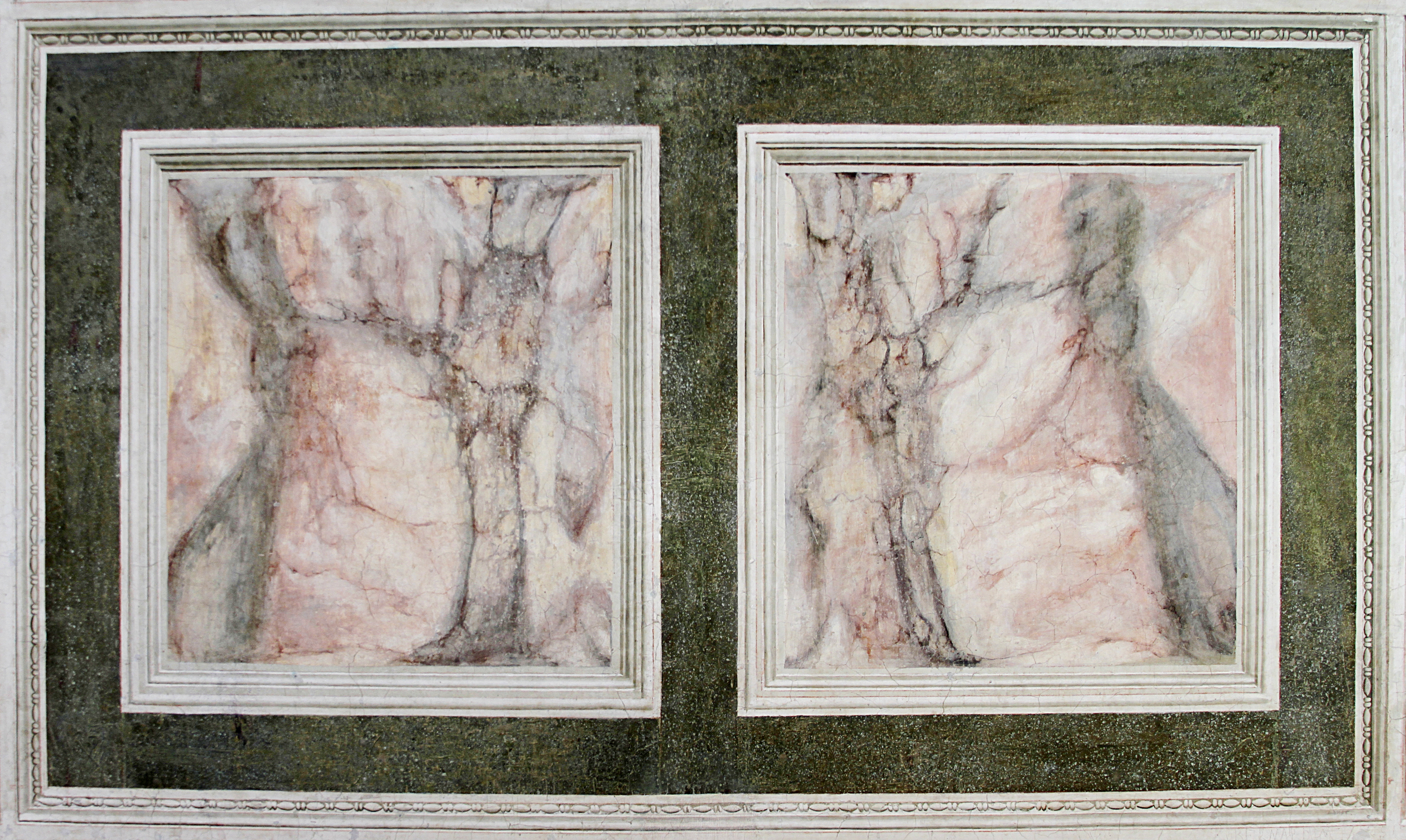 Capella dei Scrovegni - Padua